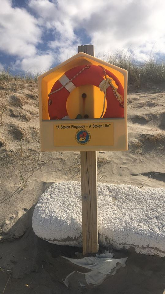 baoi tarrthála ag an trá i gCarraig Fhinne, Dhún na nGall